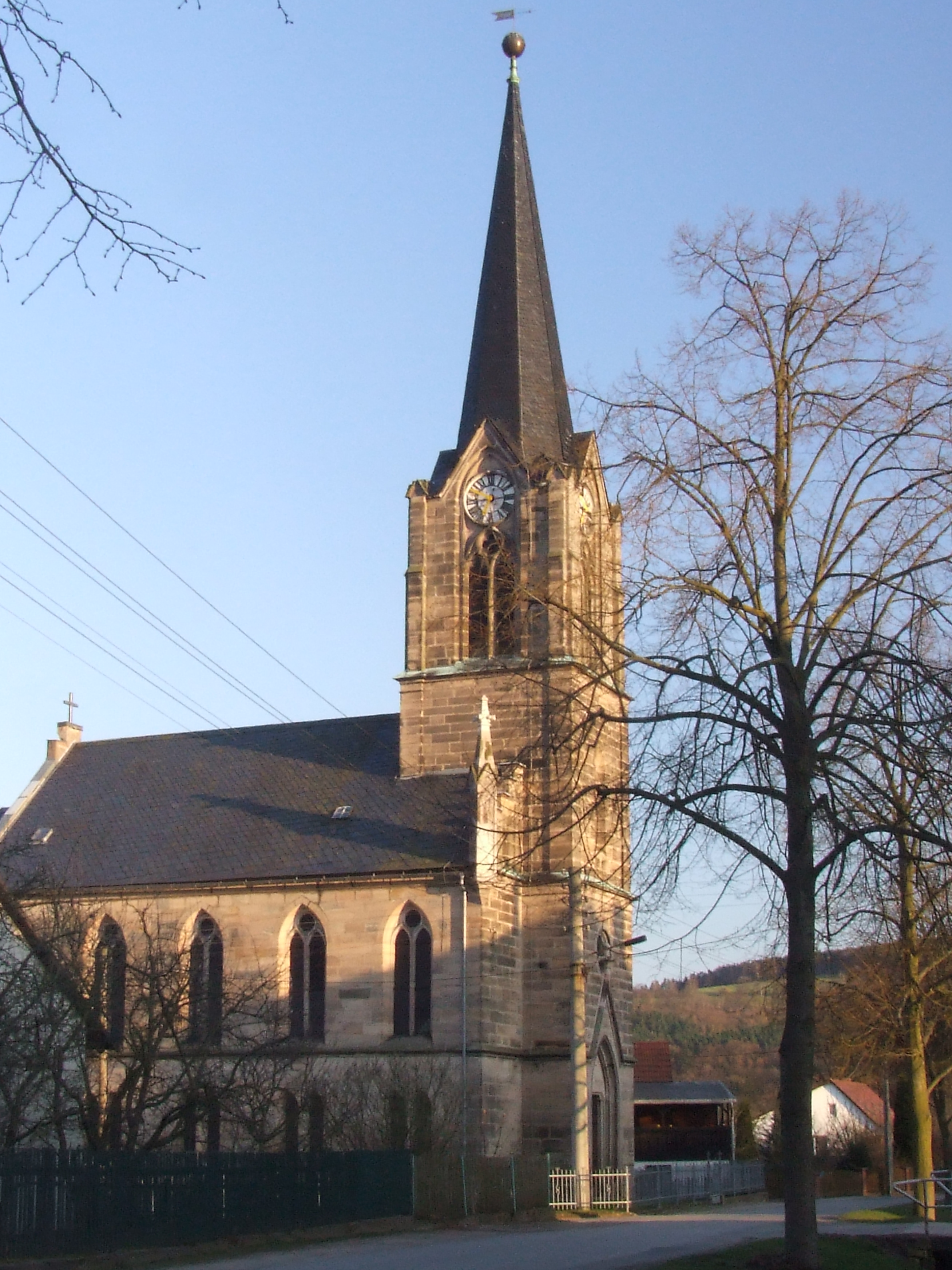 Etzelbacher Kirche